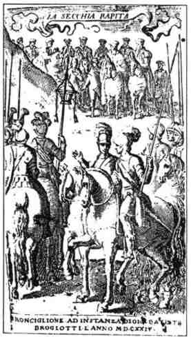 Antiporta dell'edizione de La secchia rapita di Alessandro Tassoni stampata nelle cartiere di Ronciglione nel 1624